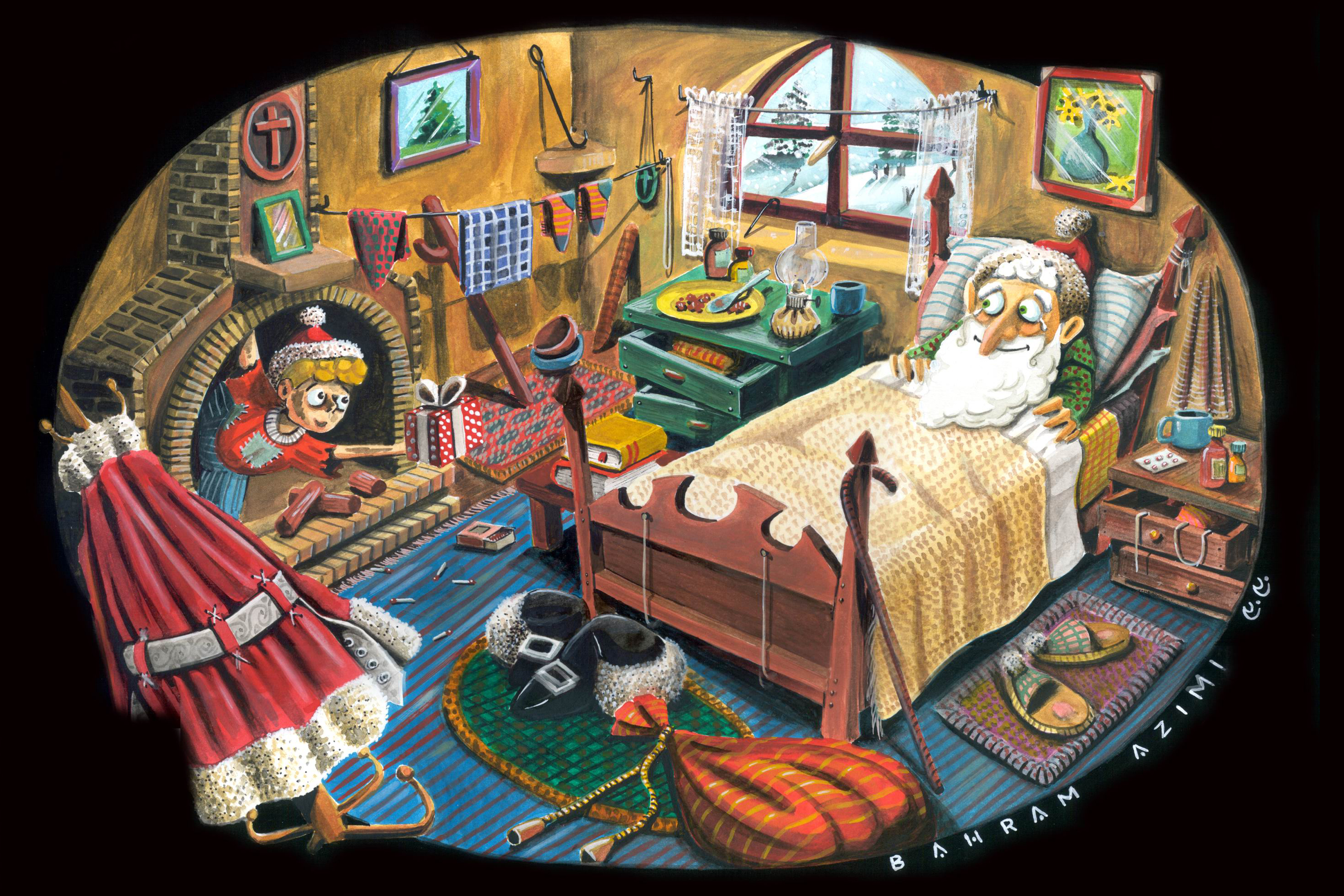 این اثر در موزه هنرهای معاصر بلغارستان می باشد